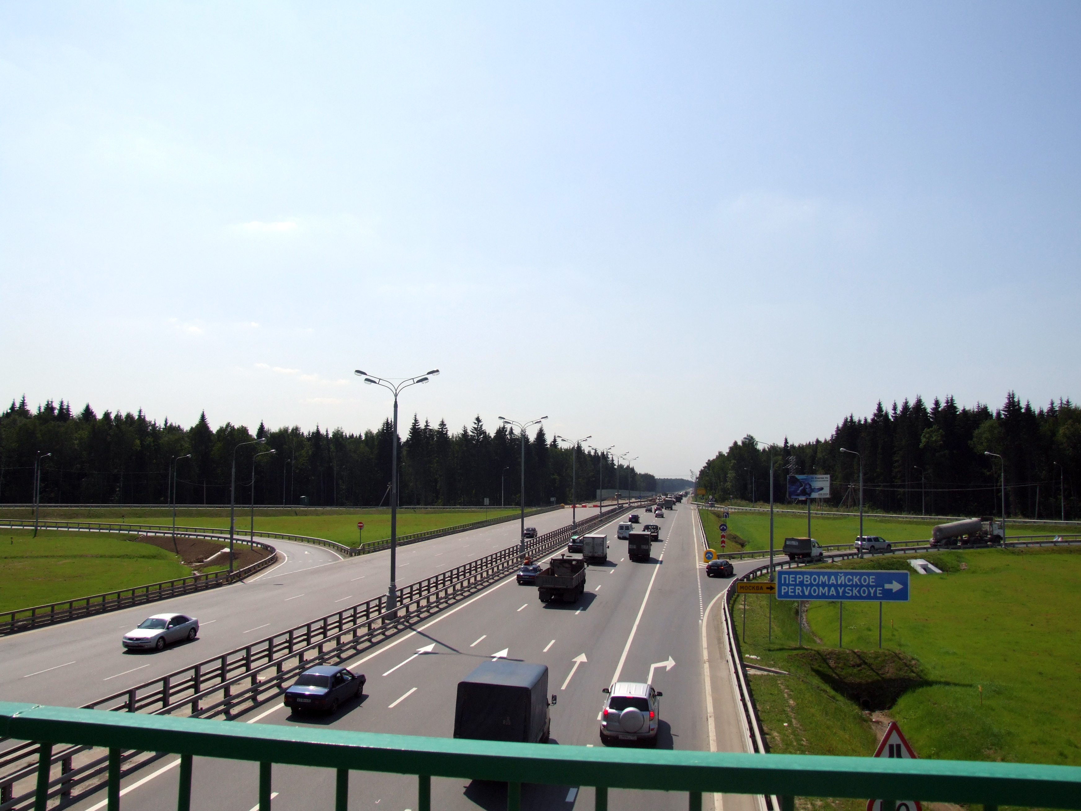 Вид на трассу М3 с эстакады Первомайское-Крёкшино